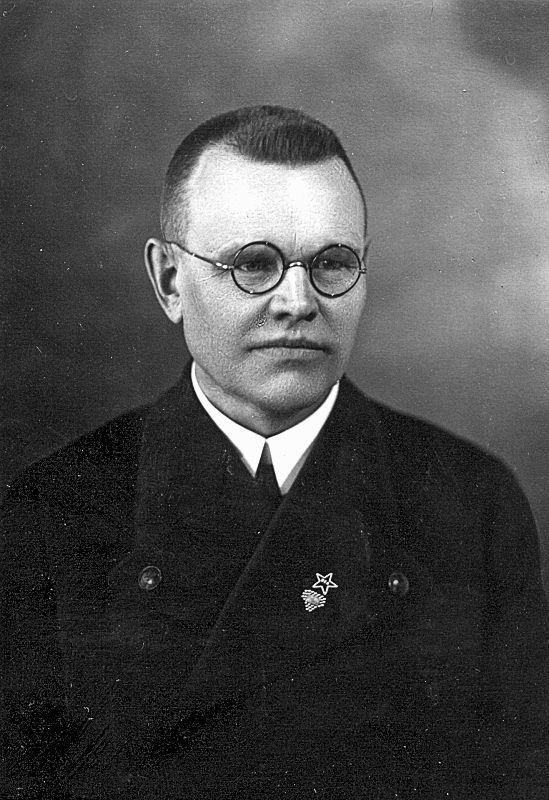 Hugo William Salokannel, Laihia um 1920